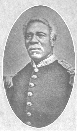 Michel Domingue, Président d'Haïti de 1874 à 1876.